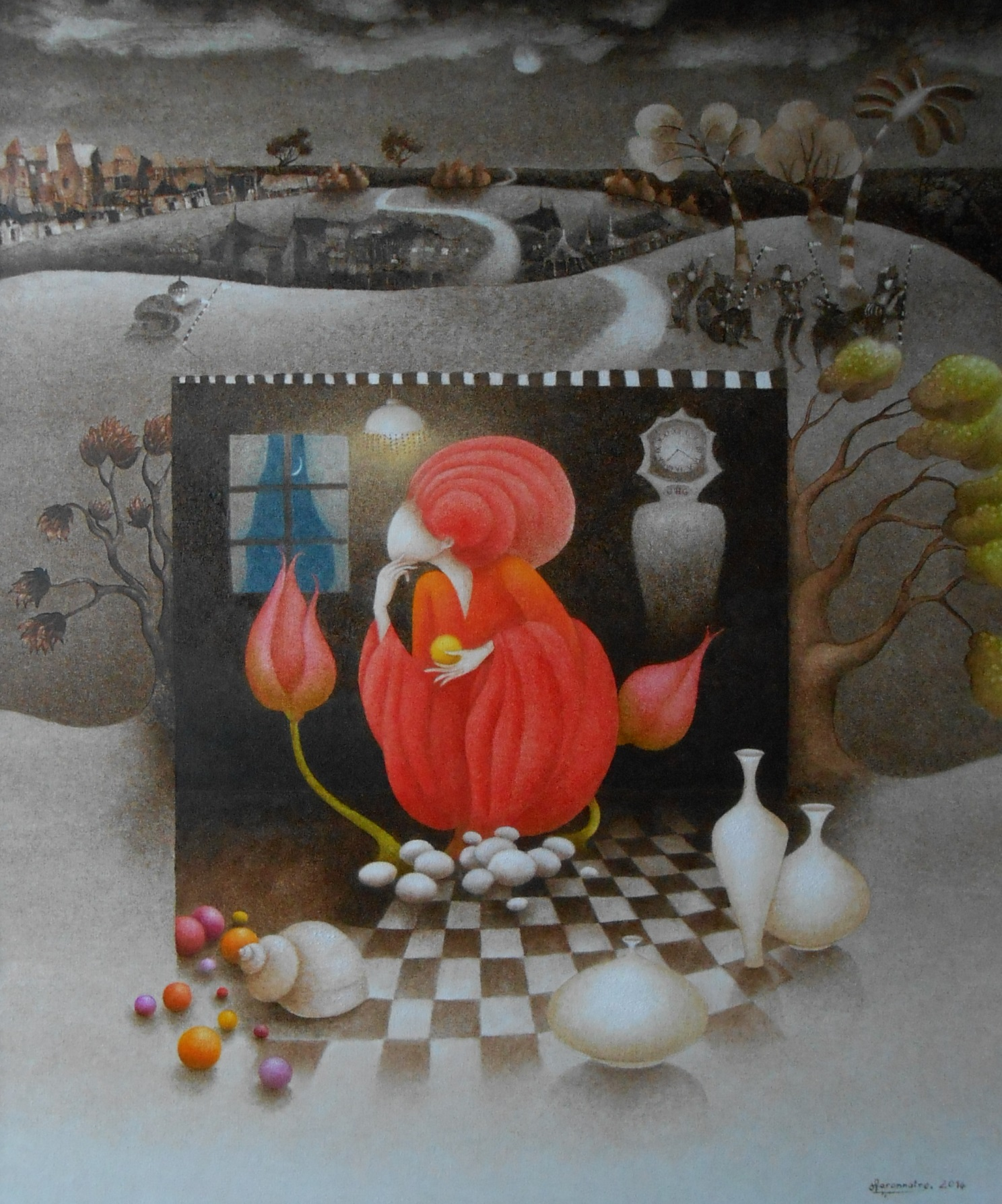 tableau